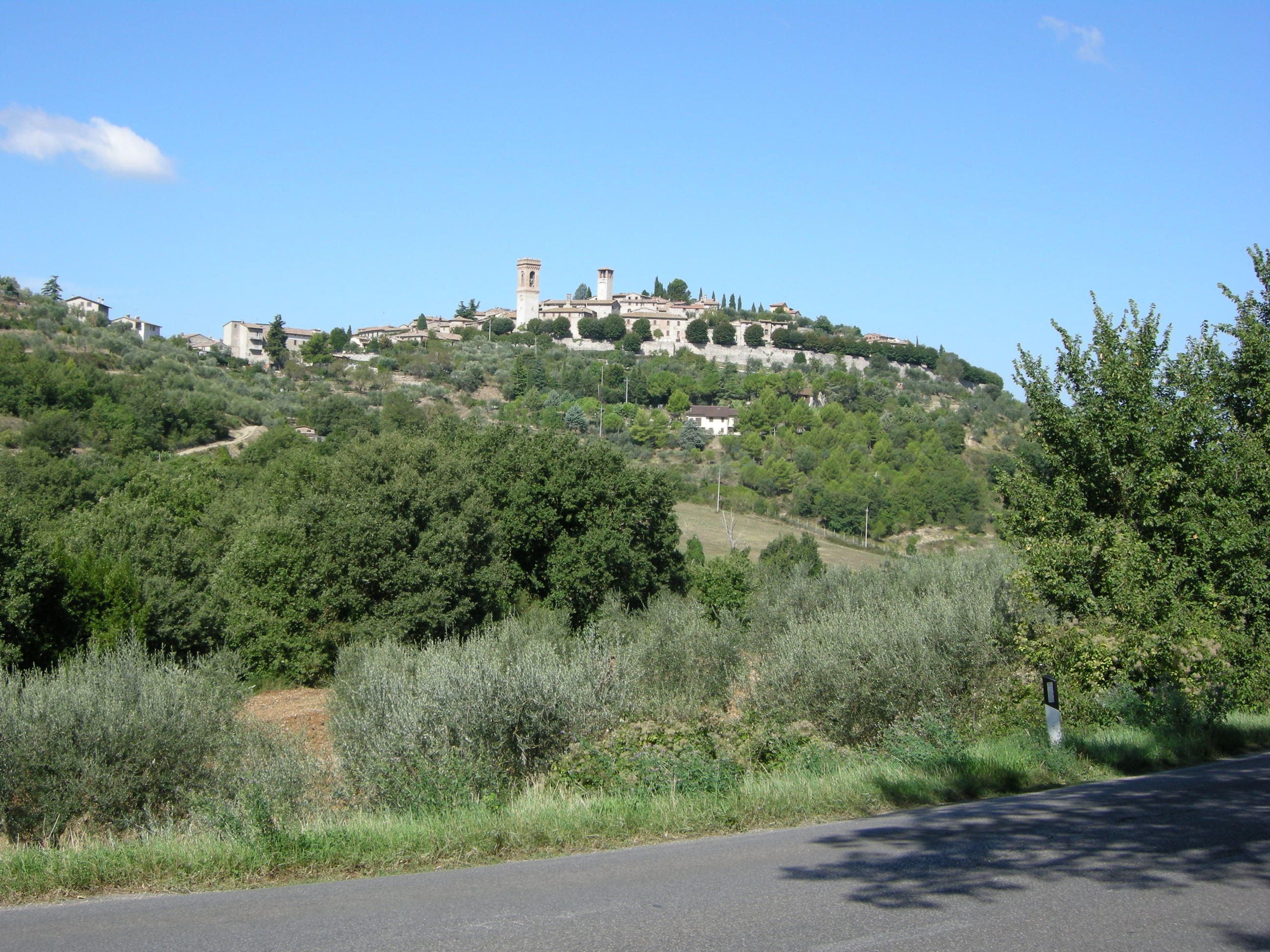 Cociano, paese